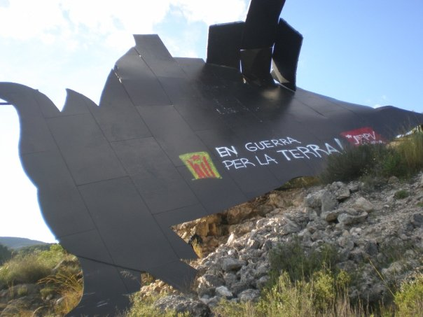 El toro de Tavernes de la Valldigna es derribado por independentistas valencianos, 2009